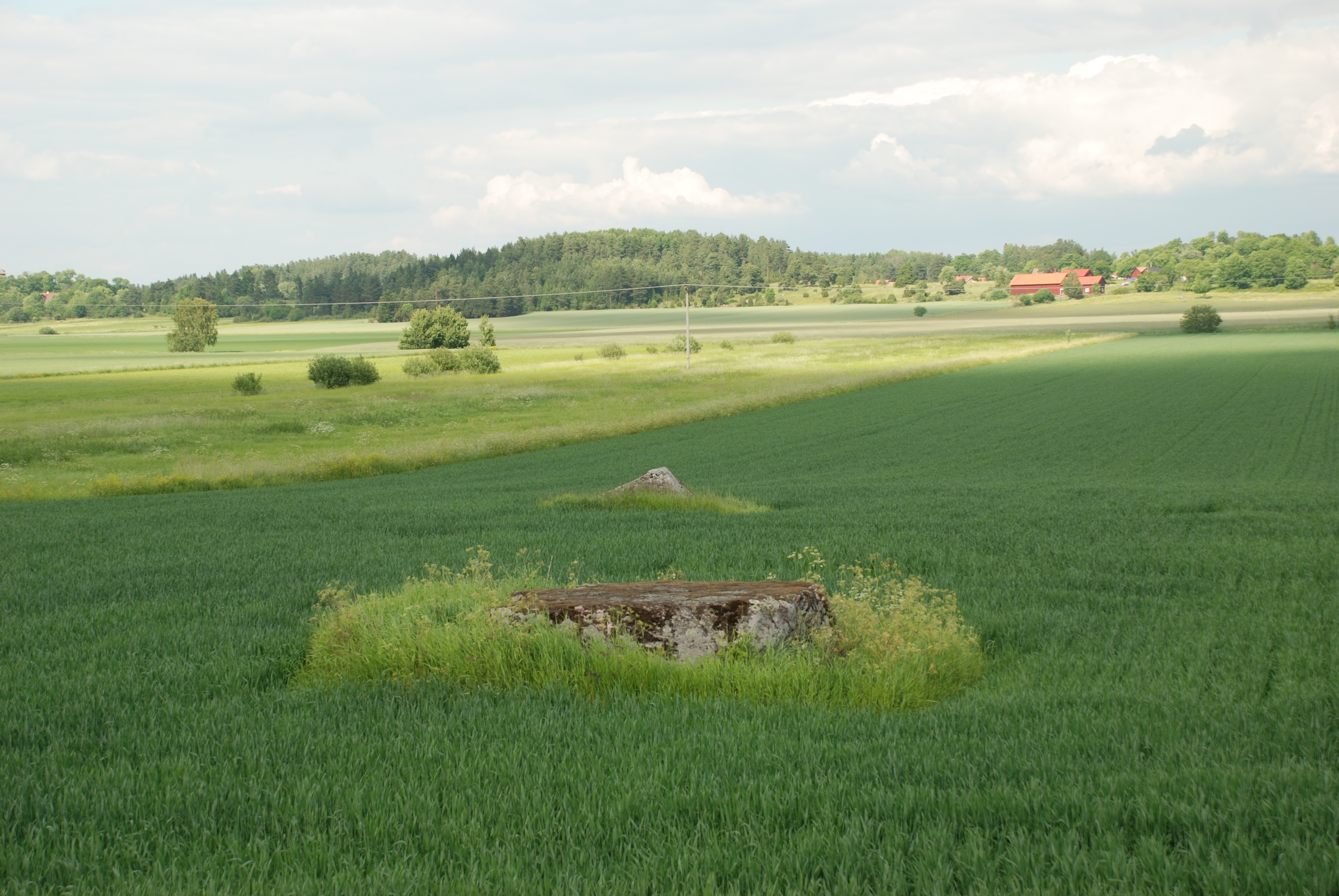 Stenen som Manfred Ohlson identifierade som Mora sten